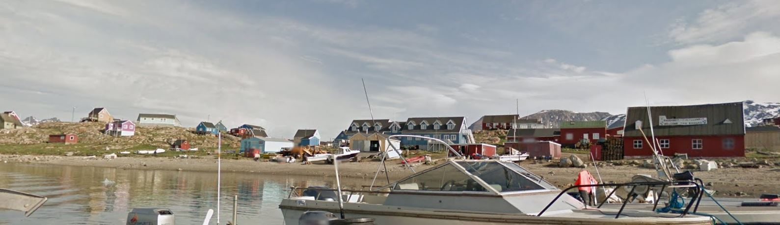 Saqqaq